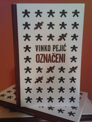 "Označeni", zbirka kratkih priča Vinka Pejića.